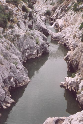 Description: Les gorges de l'Hérault (au niveau de St Jean de Fos). France. Source: Hugo Soria Licence: GFDL Hugo Soria